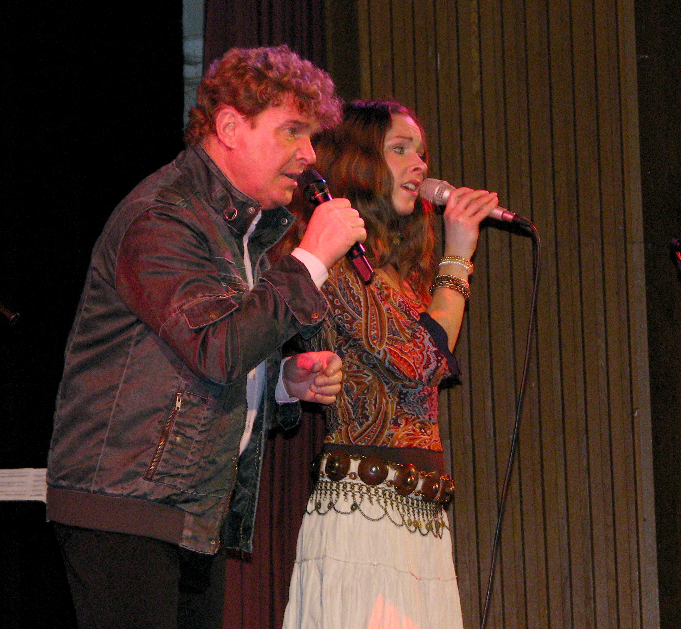 Frank Schöbel und Tochter Dominique Lacasa bei einem Konzert im Winter 2010 in Mühlhausen (Thüringen).